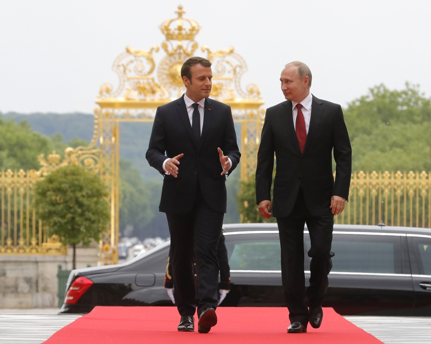 Президент России Владимир Путин с Президентом Франции Эммануэлем Макроном. Париж. Версаль